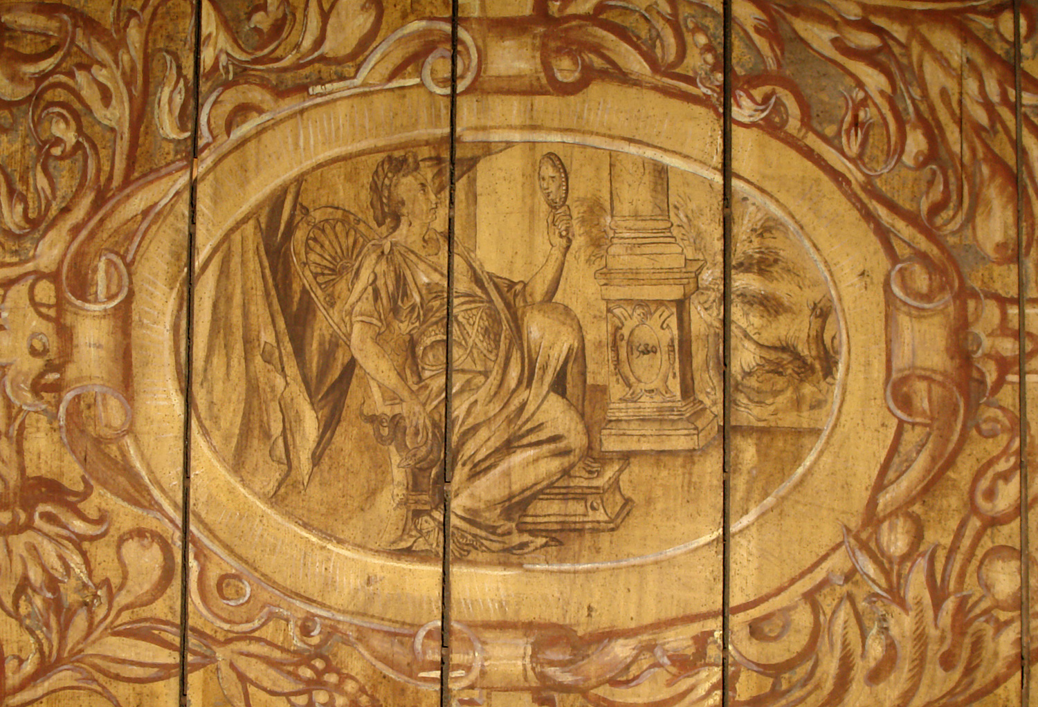 Bremen: Haus Heineken in der Sandstraße 3. Deckenmalerei von 1580, Medaillon „Prudentia“ mit der Jahreszahl „1580“